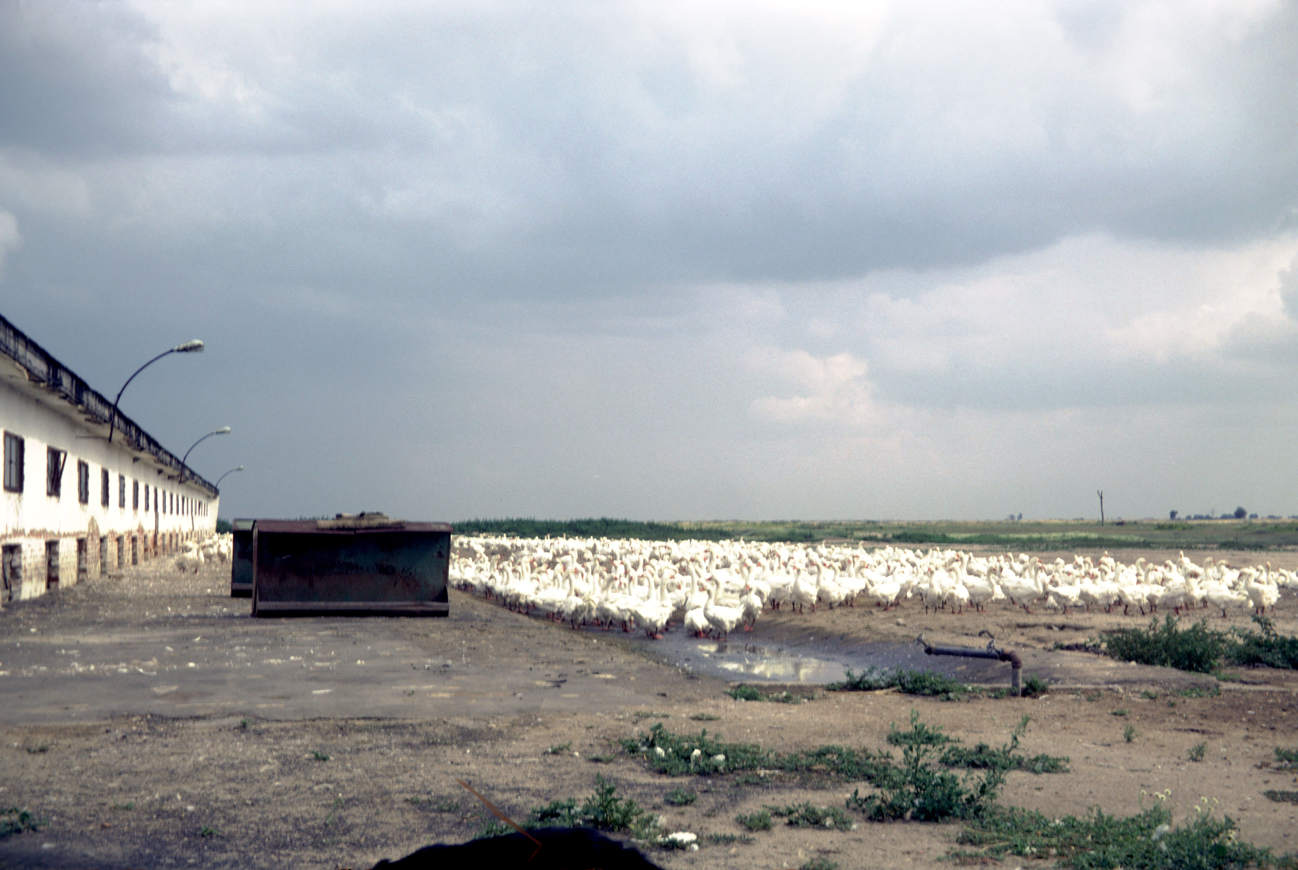 Un élevage d'oies blanches près du hameau de Kócsujfalu, sur la route n°33 (à 20 km d’ Hortobágy, dans le sens Hortobágy – Tiszafüred). Dimanche 11 juillet 1982. Près de Kócsujfalu, comitat de Jász-Nagykun-Szolnok, Hongrie.